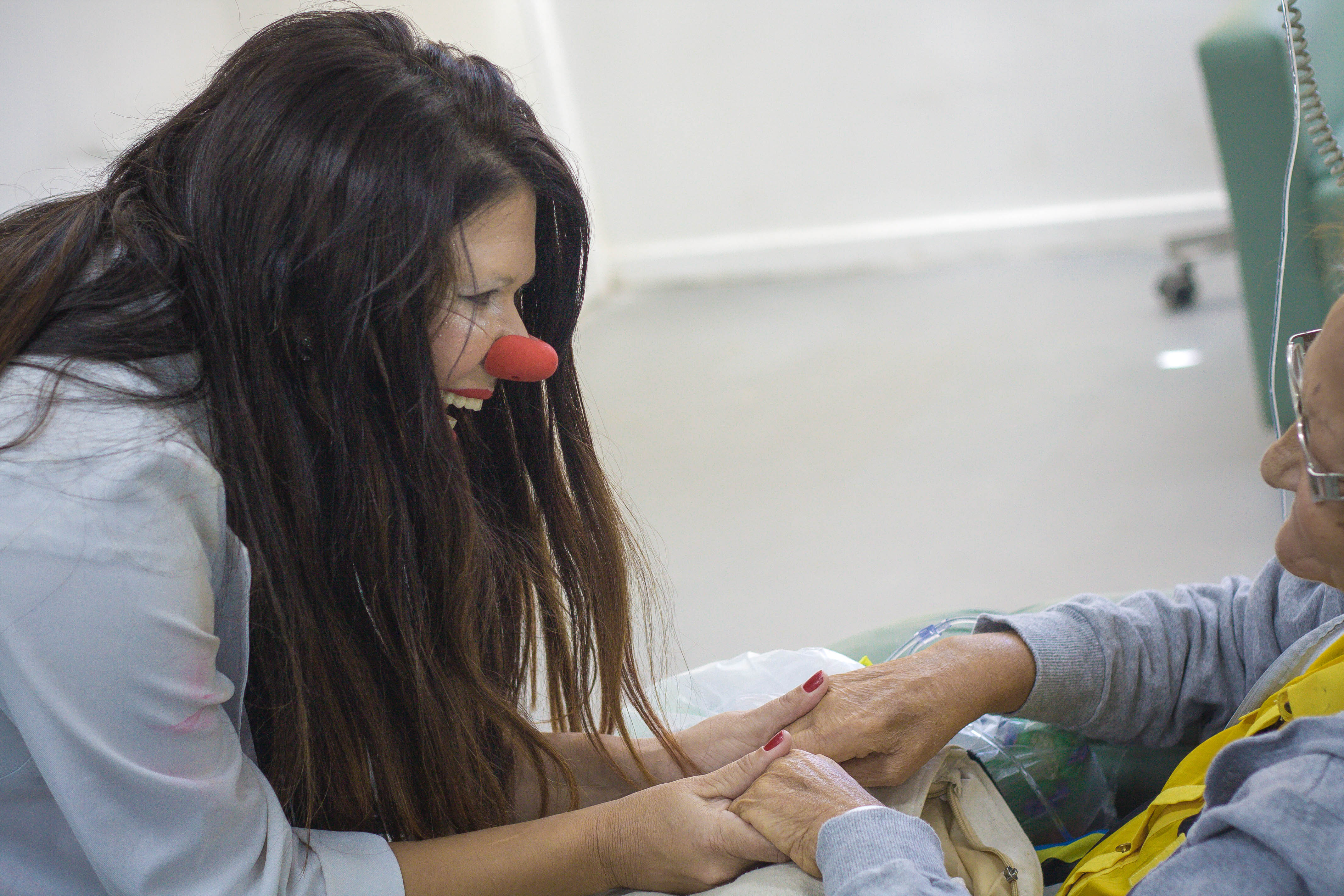 Dra. Chuchu acolhendo paciente no Hospital de Câncer de Pernambuco.